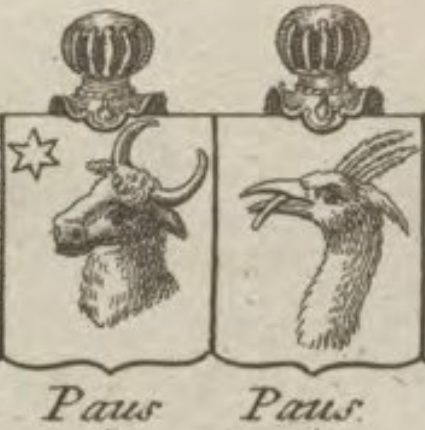 Våpen med oksehode og stjerne og med griff i Lexicon over Adelige Familier i Danmark, Norge og Hertugdømmerne